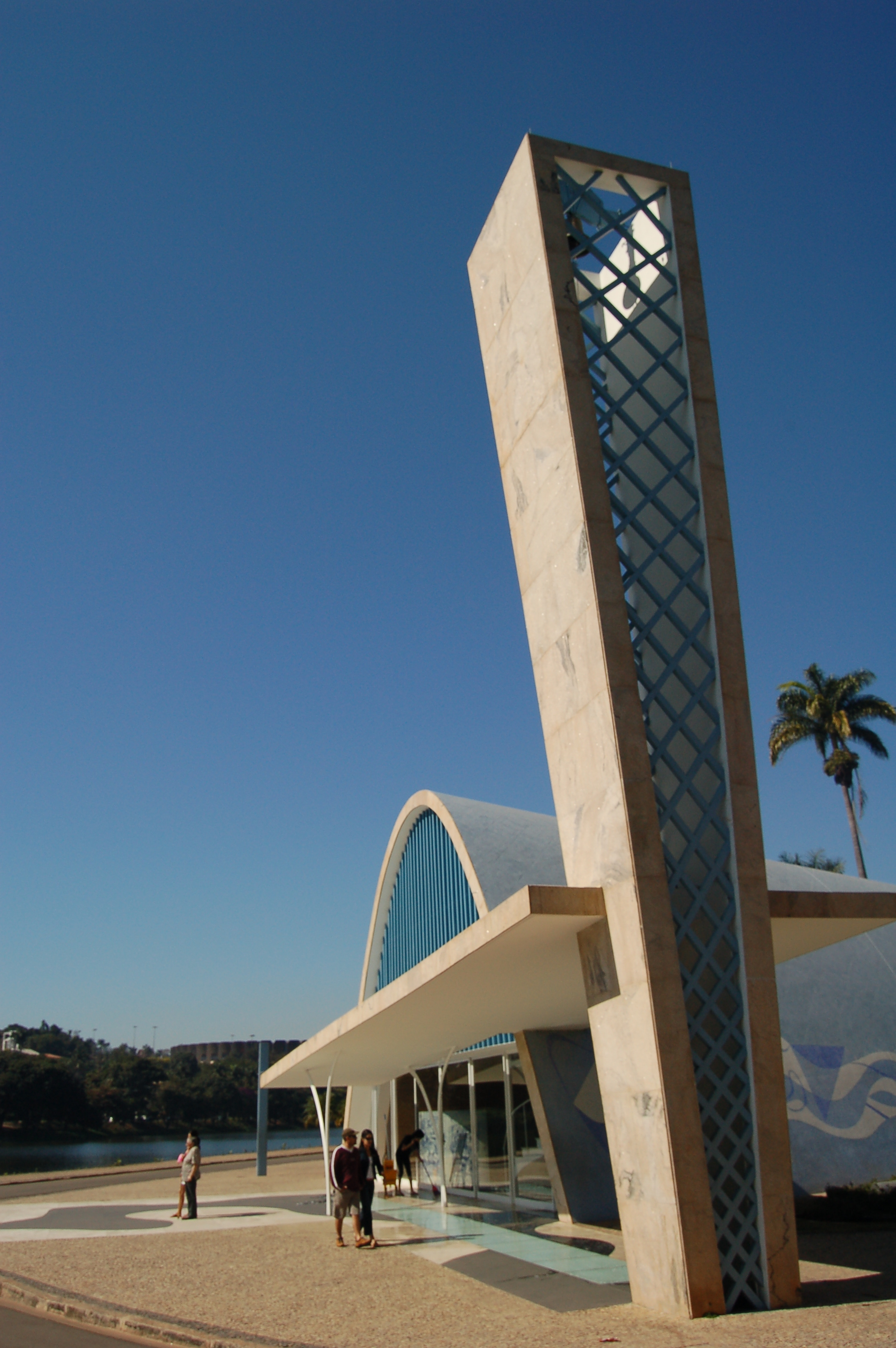 Oscar Niemeyer's Igreja São Francisco na Pampulha, Church of St Francis, in Belo Horizonte, Brazil.